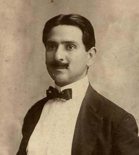 Fotografia del pittore Achille d'Albore conservata negli archivi di famiglia